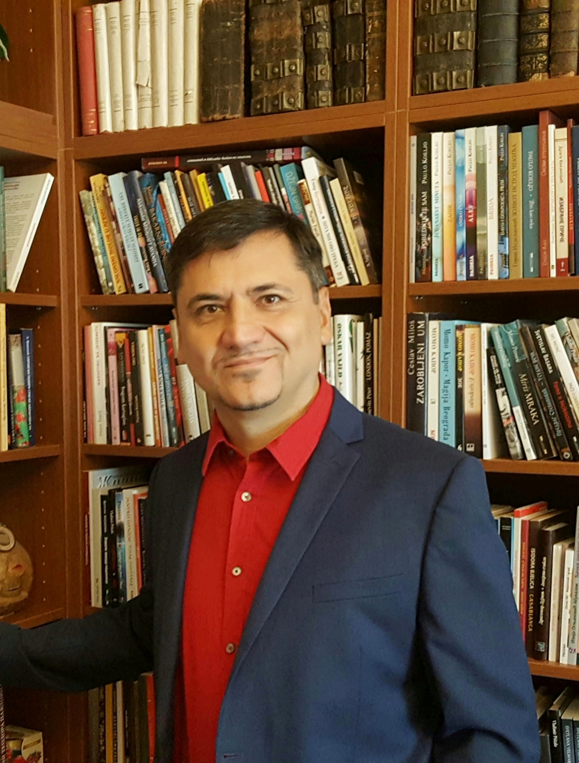 Драган Јаковљевић